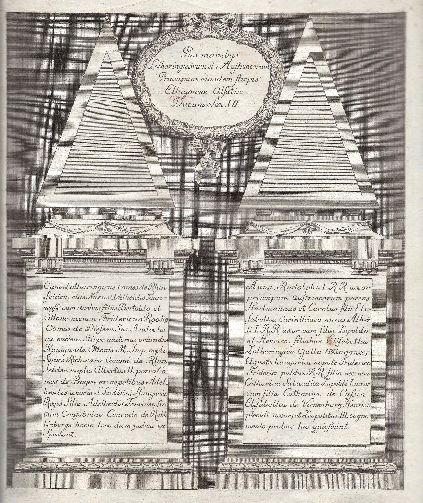 Kupfertafel mit den Epitaphen der Ahnen des Hauses Habsburg aus: Martin Gerbert: De Rudolpho Suevico, St. Blasien, 1785